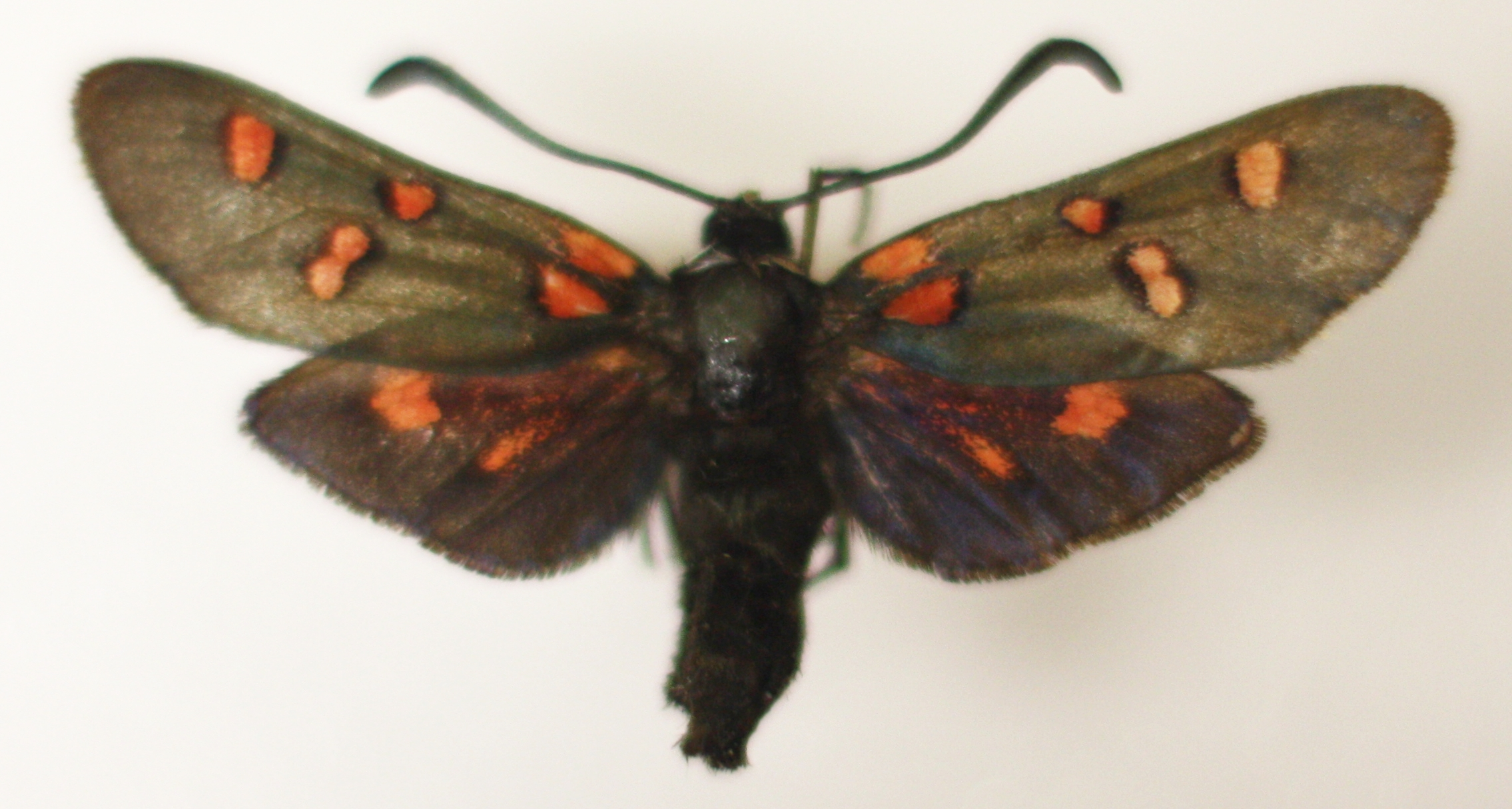 Naturkundliche Sammlung Übermaxx Überseenuseum Bremen; Schmetterlinge und andere